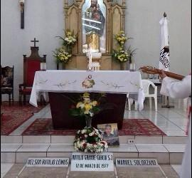 Tumba de Rutilio Grande